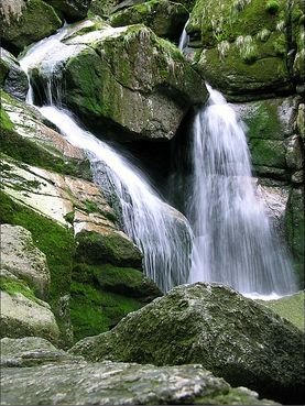 Vodopád Černého potoka